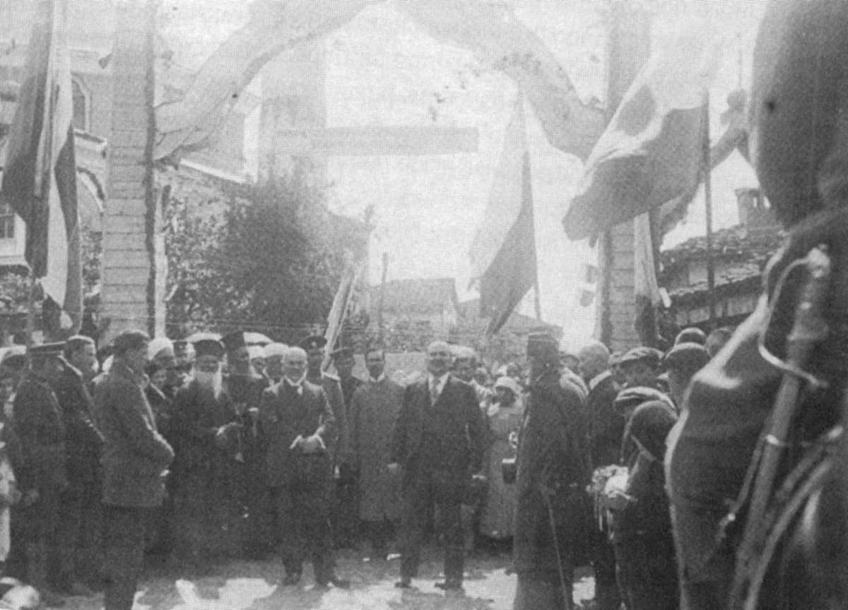 Посещение на министъра на народното просвещение Петър Пешев в Тетово